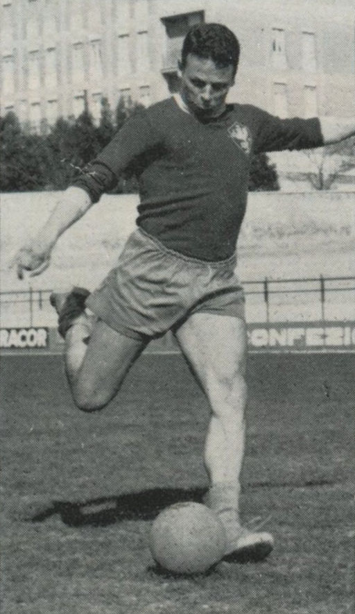 Il calciatore italiano Ilario Castagner in allenamento al Perugia nella prima metà degli anni 60 del XX secolo.